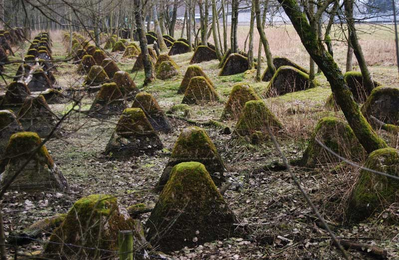 Panzersperren/Höckerlinie, Westwall bei Hollerath/Eifel